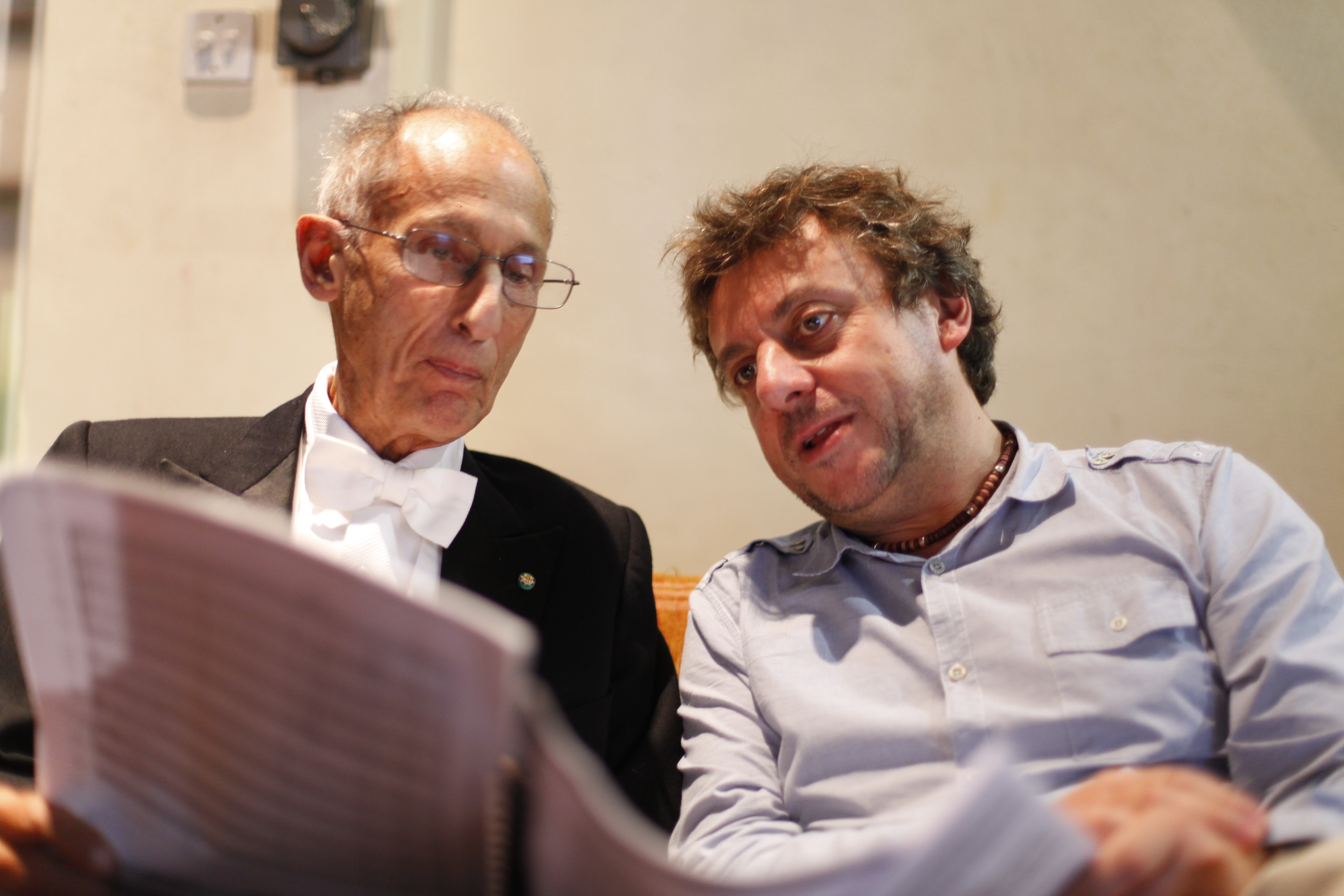 El director de orquesta italiano Claudio Scimone y el productor Gianluigi Salvioni